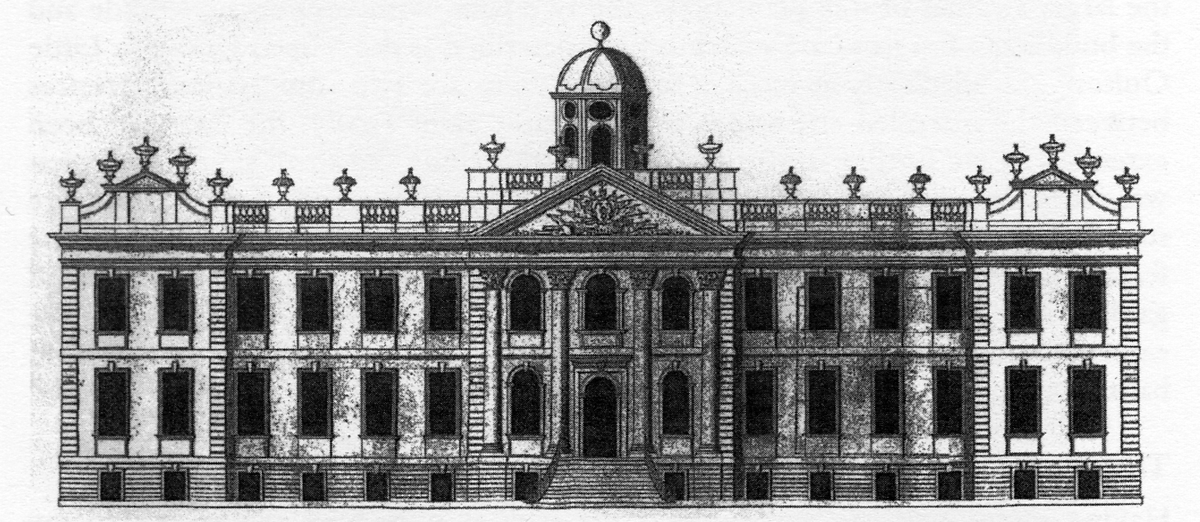 Engraving